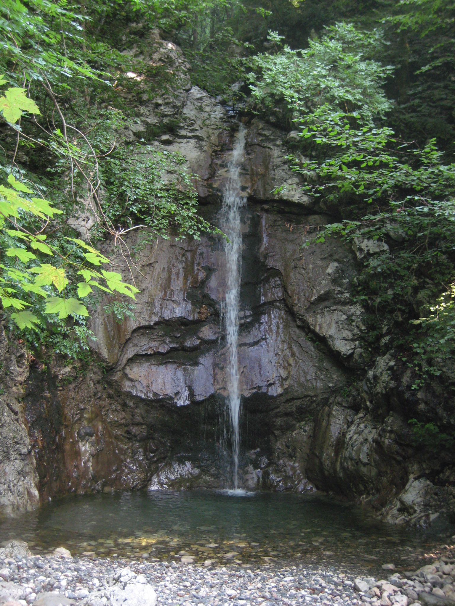 Srednja vas v Bohinju, village in Slovenia. Ribnica waterfall no.2